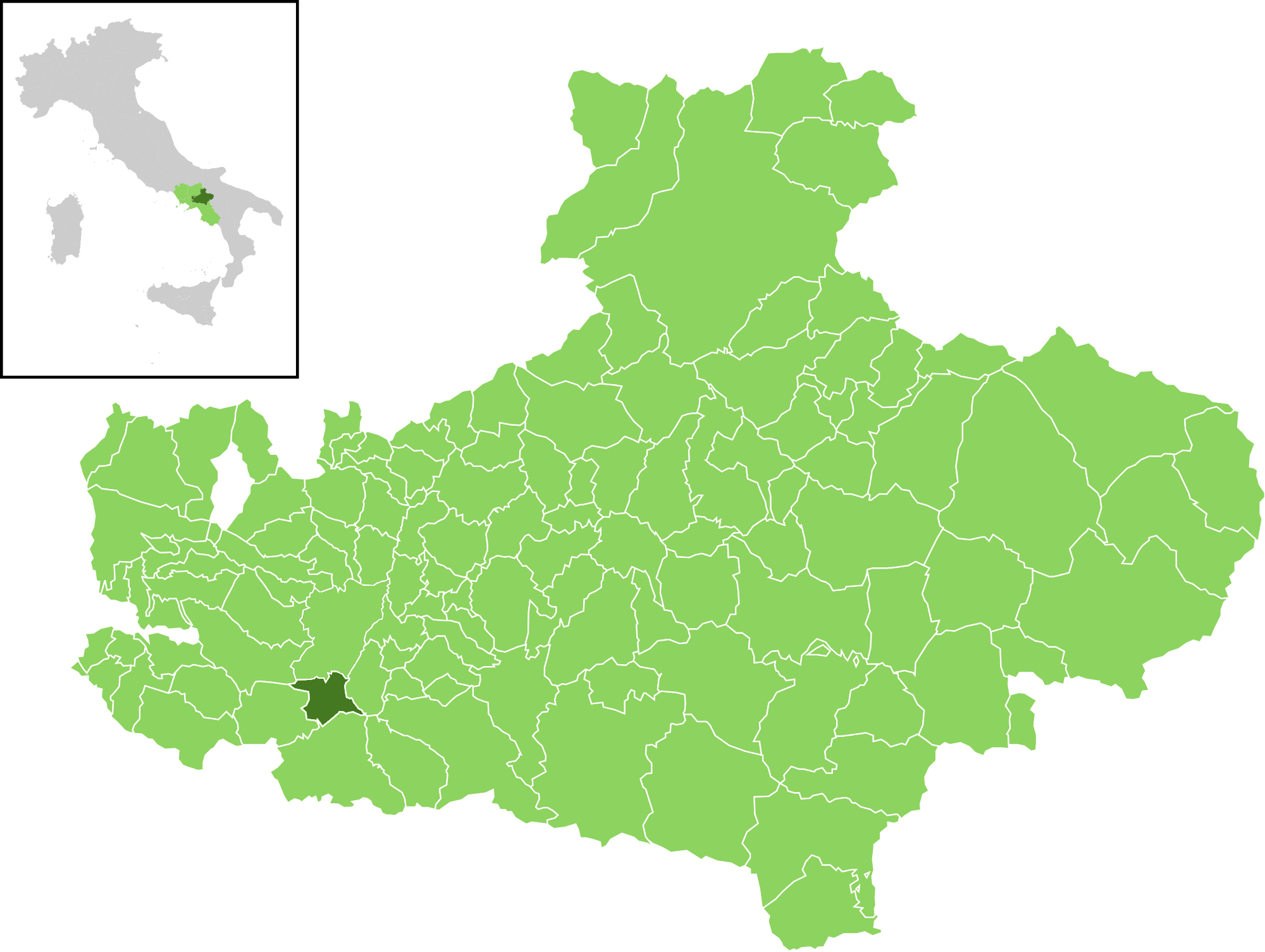 Il comune all'interno della provincia di Avellino